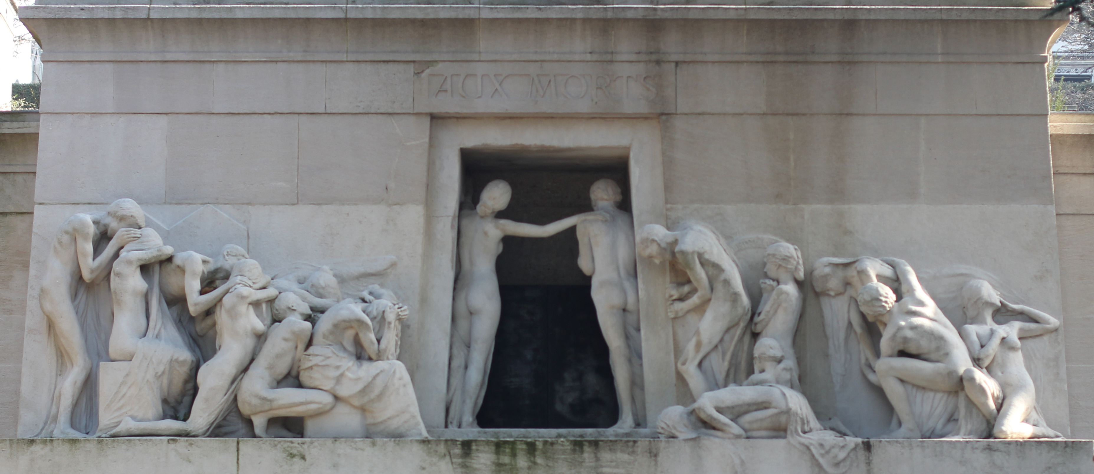 vue générale, face avant